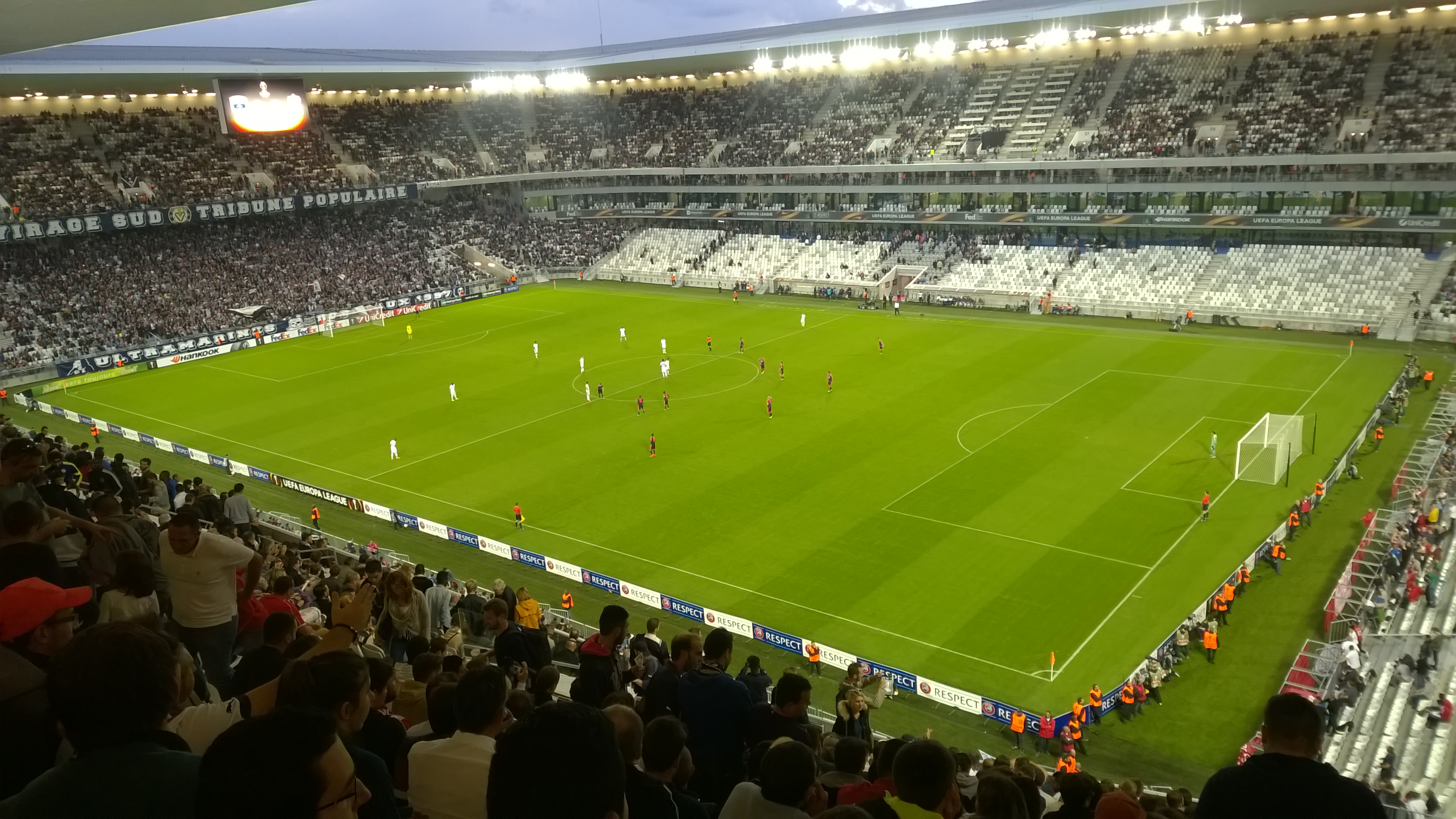 Match de football entre les Girondins de Bordeaux et le Liverpool FC comptant pour la Ligue Europa au stade MATMUT Atlantique le 17 septembre 2015.